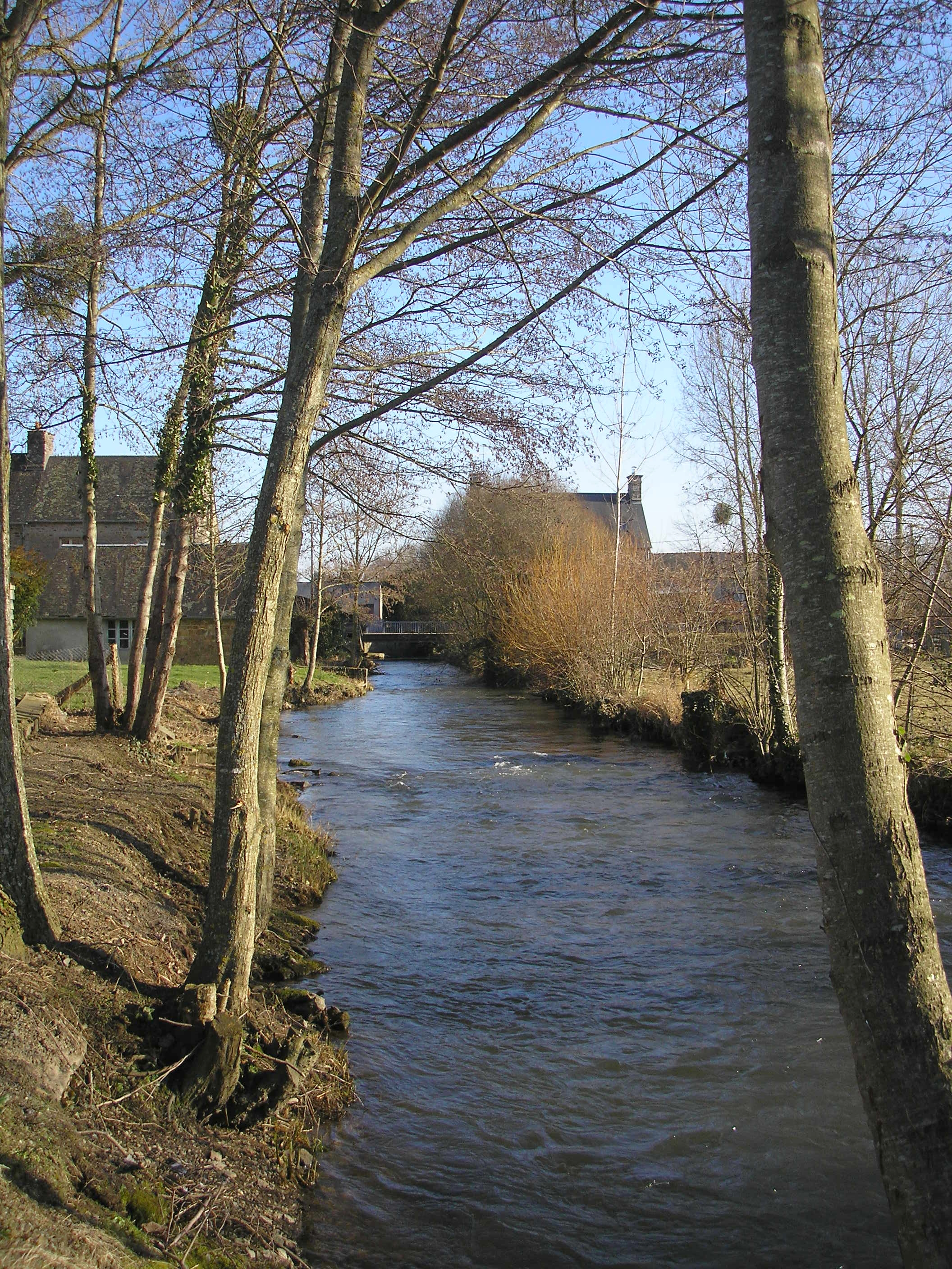 Cuves (Normandie, France). La Sée.